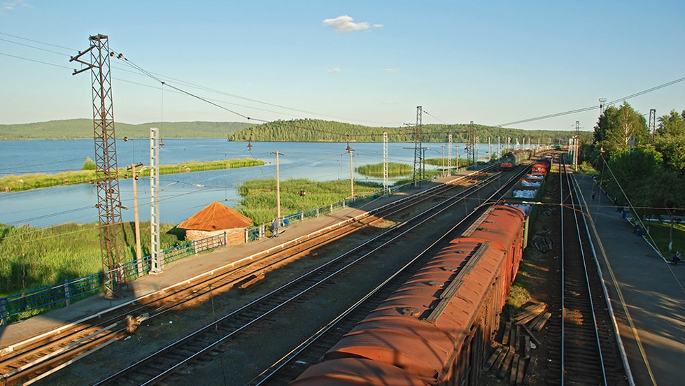 Железнодорожная станция Верх-Нейвинск